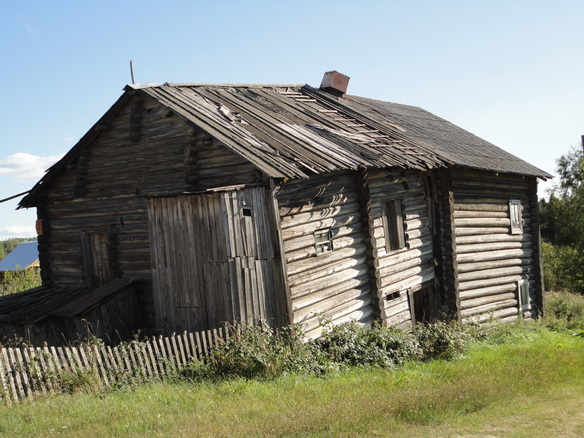 Старинный деревянный дом в карельской деревне Маньга.